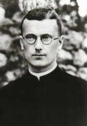 Pater Franz Reinisch SAC